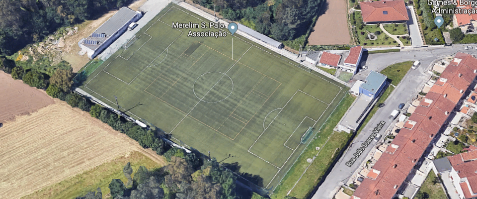 Campo de jogos de merelim s. paio - braga